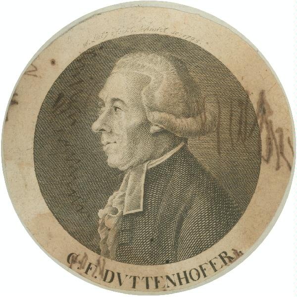 Christian Friedrich Duttenhofer (1742–1814), Kupferstich von Johann Gottfried Schmidt (1764–1803) nach einer Zeichnung von W. Lutz. Bezeichnung oben: „W. Lutz del[ineavit] J. G. Schmidt sc[ulpsit] 1795“ (gezeichnet von W. Lutz, gestochen von J. G. Schmidt 1795). Bezeichnung unten: „C. F. DUTTENHOFER“.